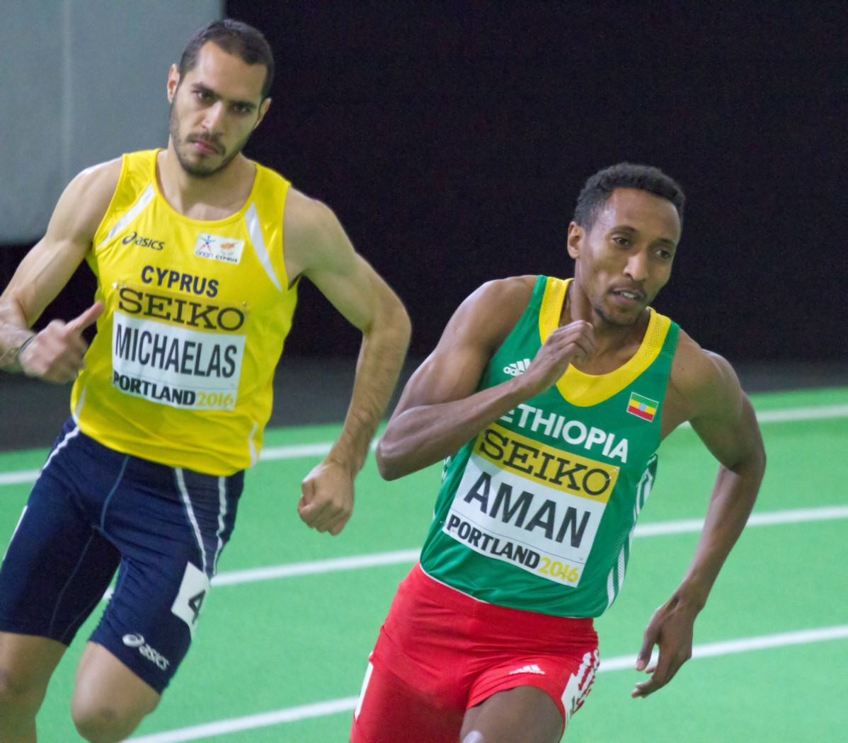 173 800m reeksen aman